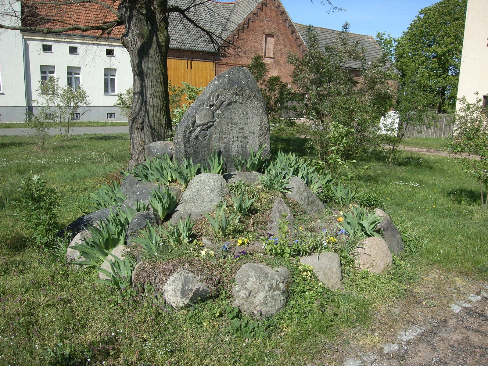 Marke (Anhalt), Gefallenendenkmal, Kriegerstein